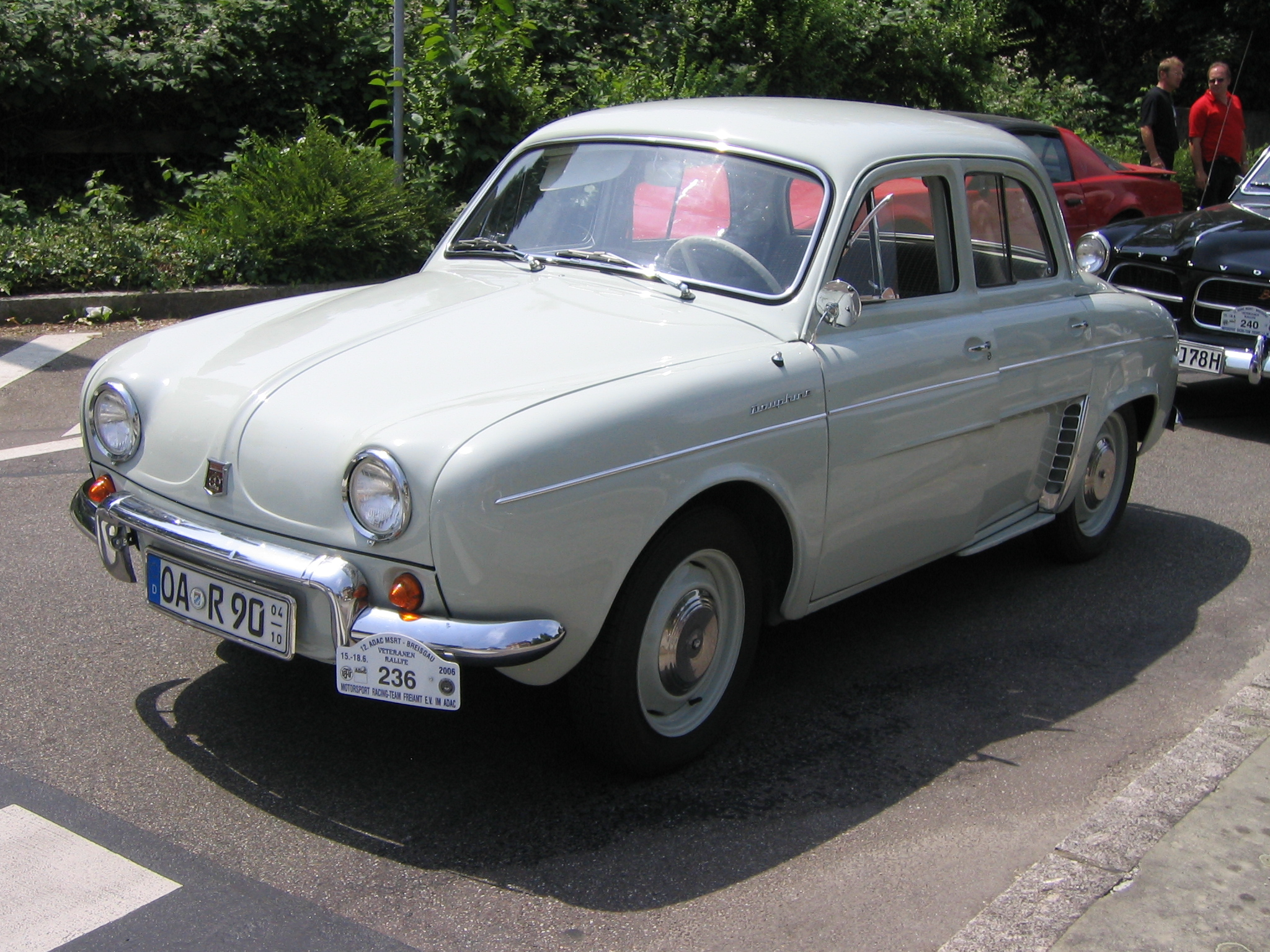 aufgenommen während eines Oldtimer-Treffens im Emmendingen, Deutschland